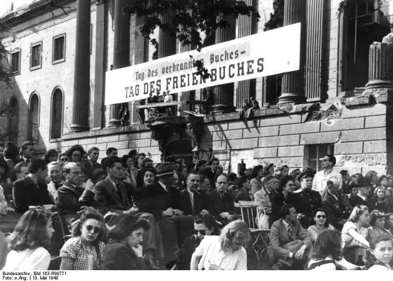 Berlin, Universität , Tag des freien Buchs ADN-ZB Am 10. Mai 1947, dem "Tag des freien Buches", fand vor der Berliner Humboldt-Universität eine Kundgebung statt. 596-47